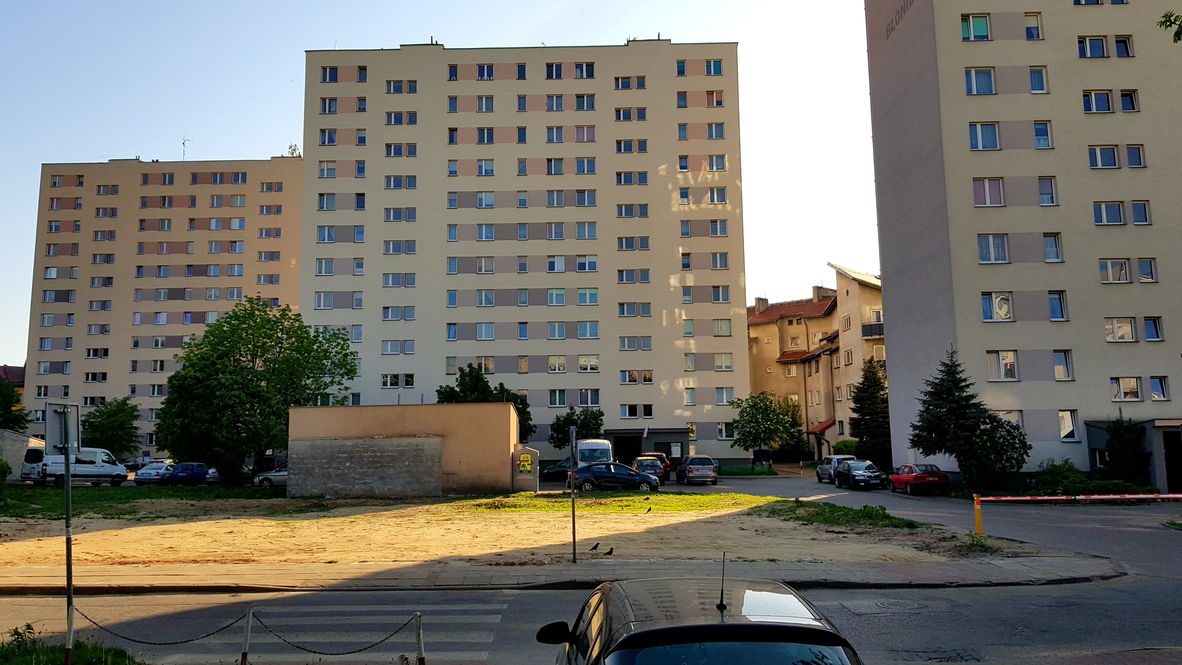 Os. Błonie w Siedlcach (Maj 2018)